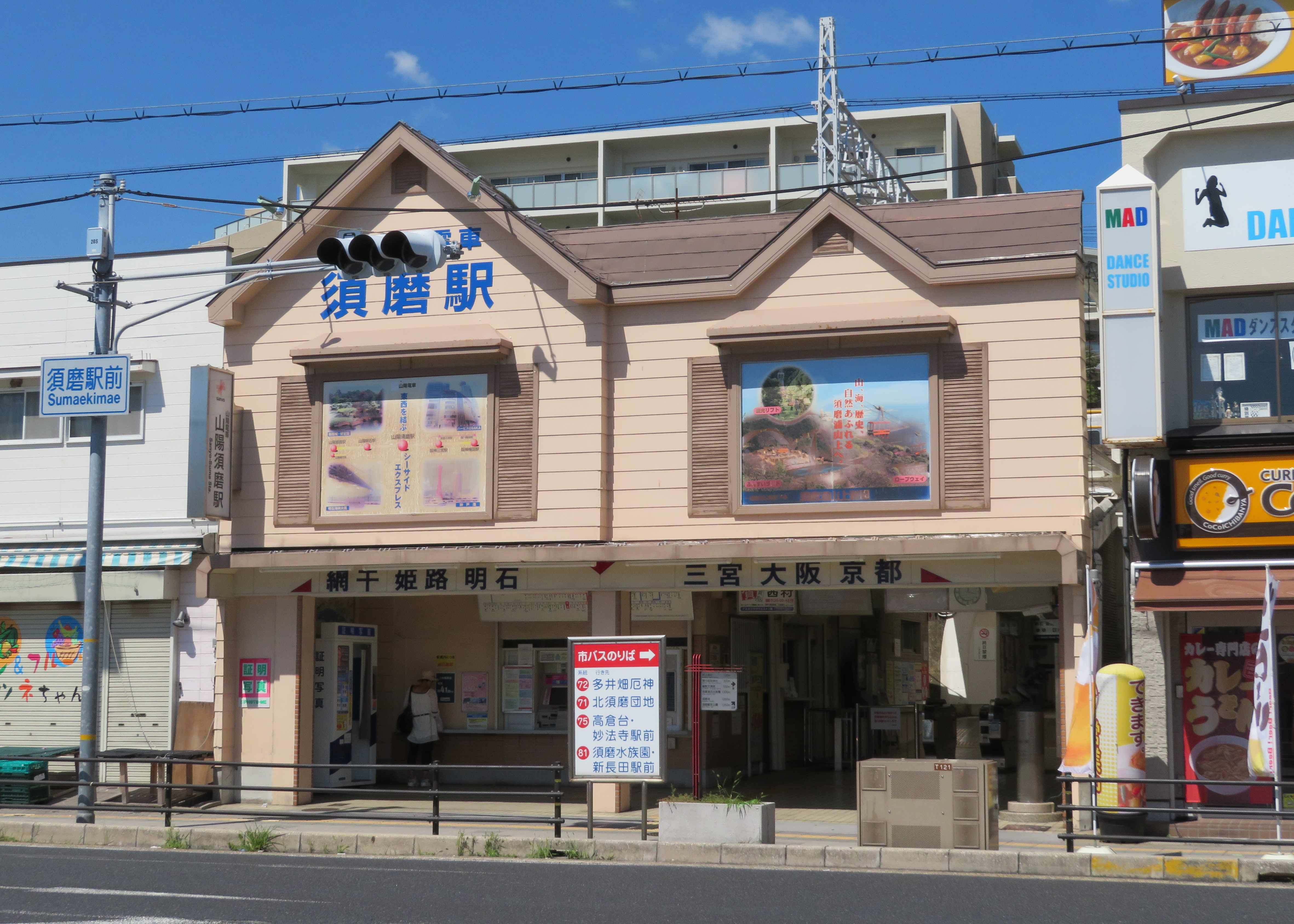 山陽須磨駅